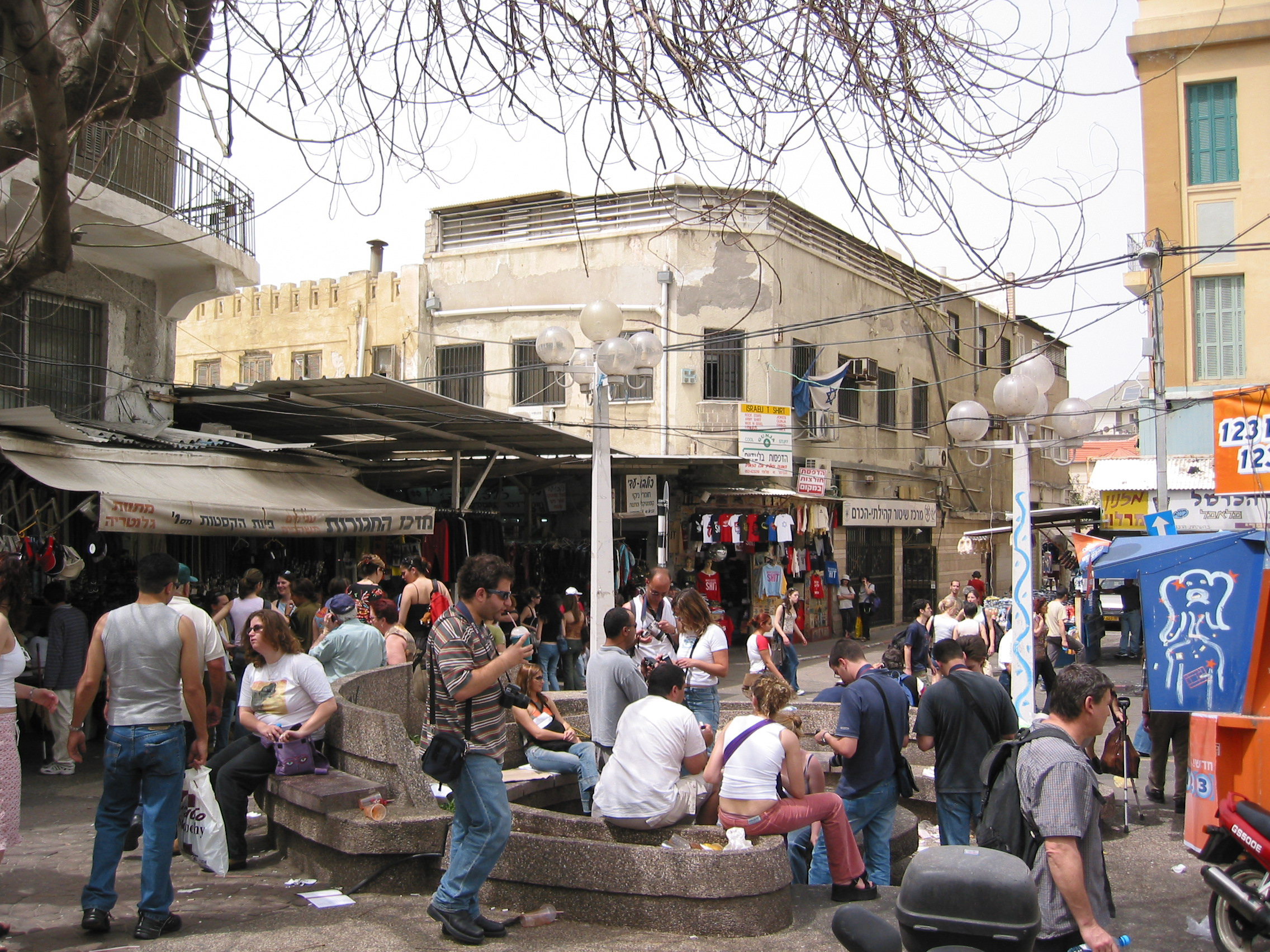 Hacarmel market, "Megen David" square, Tel Aviv